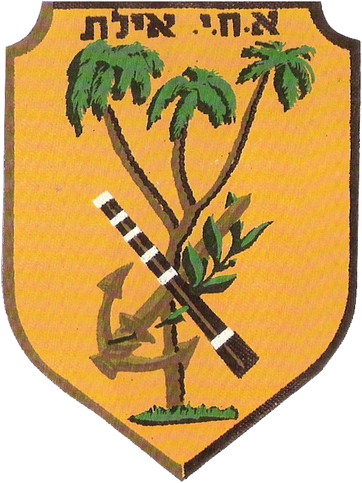 סמל אח"י אילת